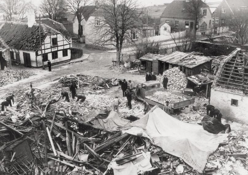 Oprydning efter tyskernes schalburgtage mod Frederikshavns Avis.